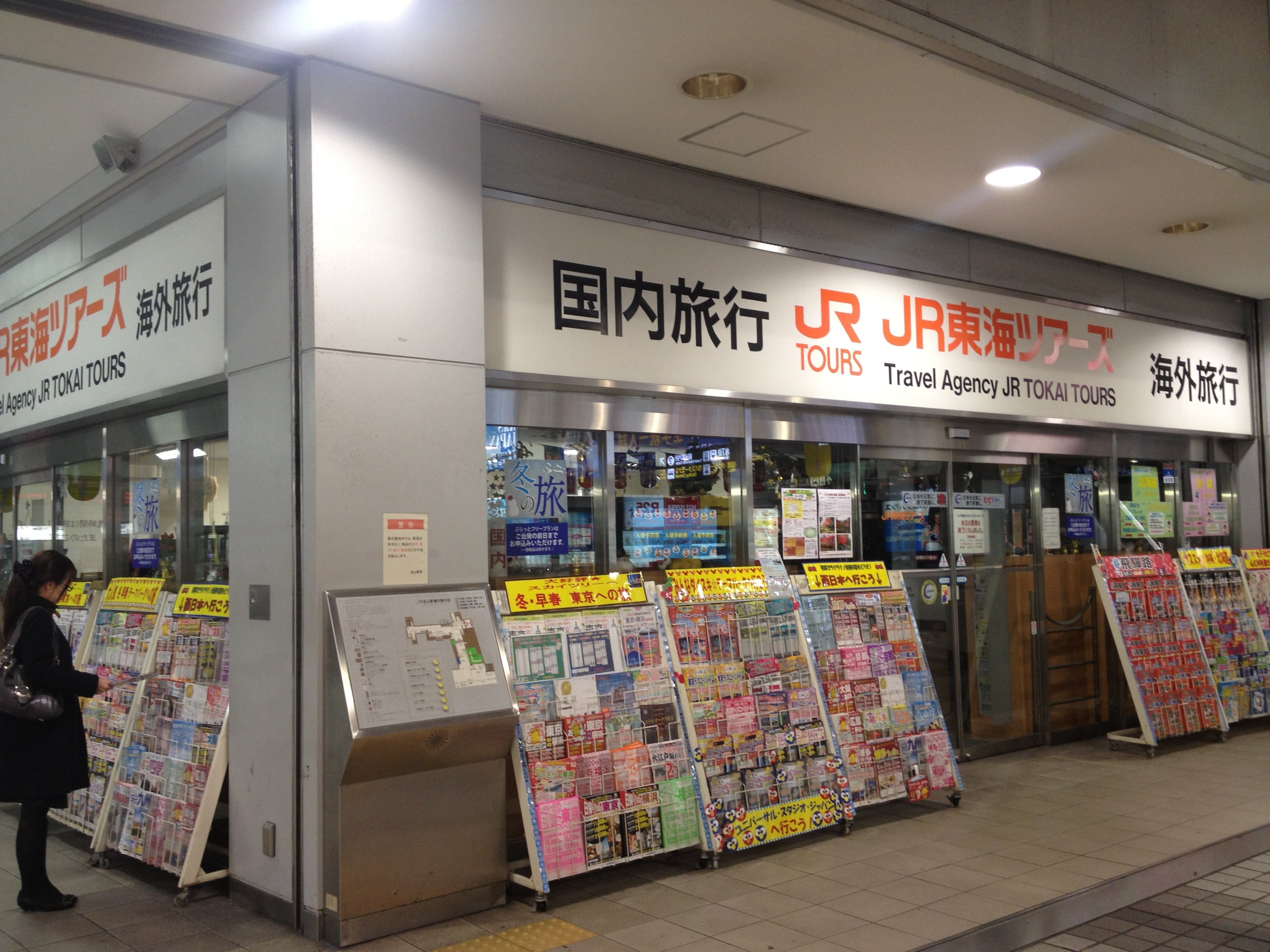 JR東海ツアーズ金山支店